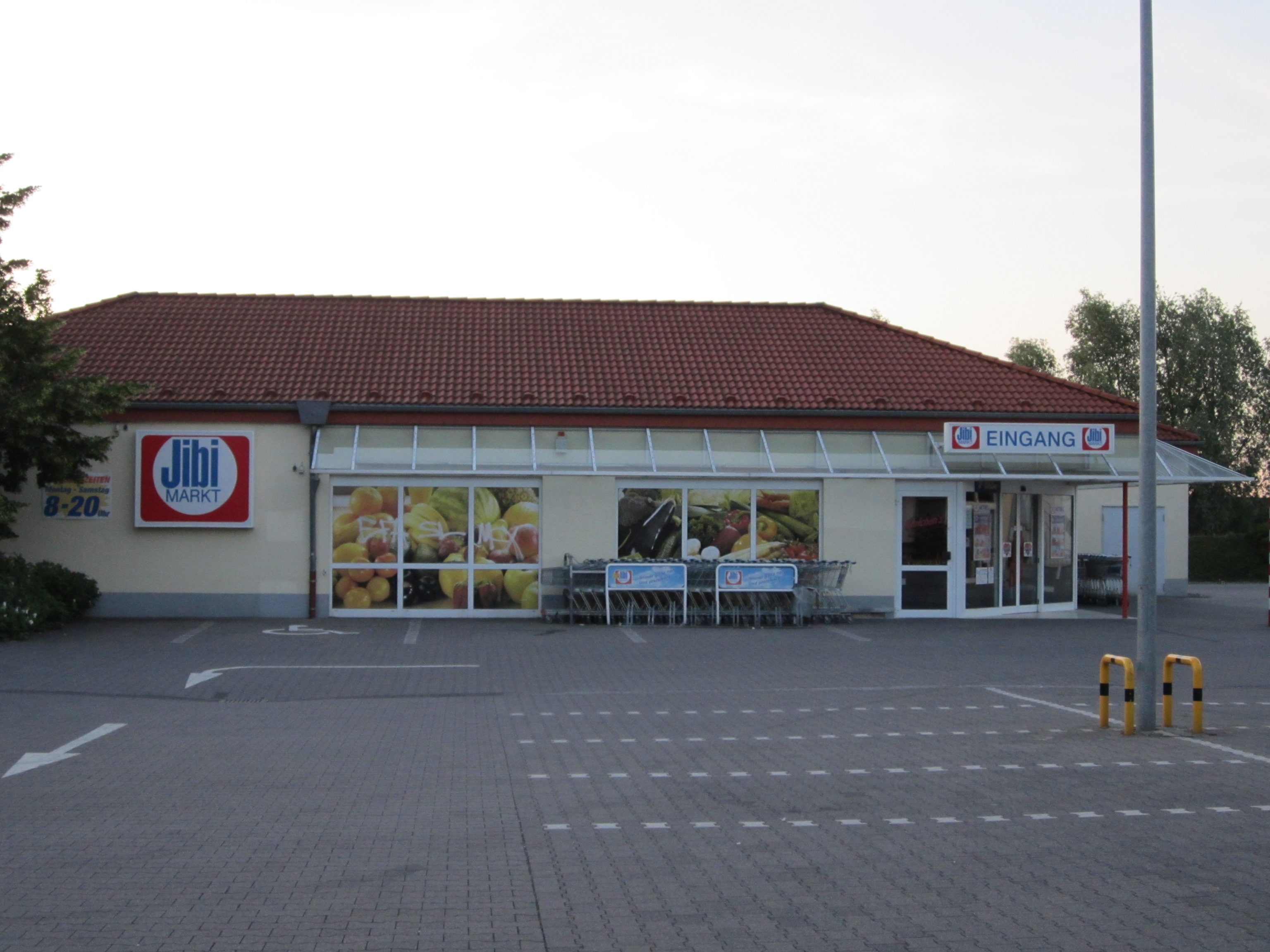 Eine Filiale der Supermarktkette "Jibi" in Westerenger (Kreis Herford, Nordrhein-Westfalen)